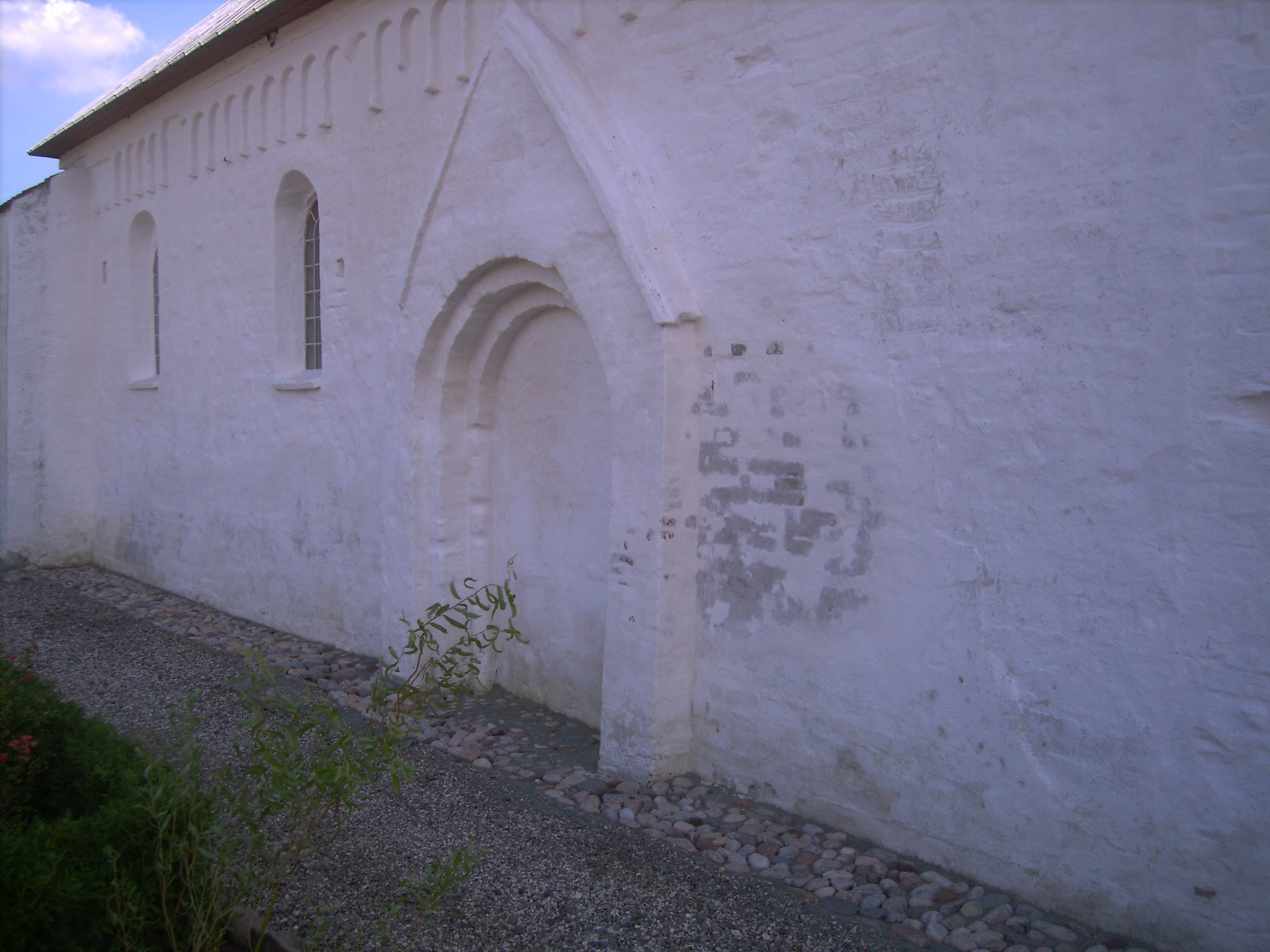 Estruplund Kirke,Rougsø Kommune, closed north entrance